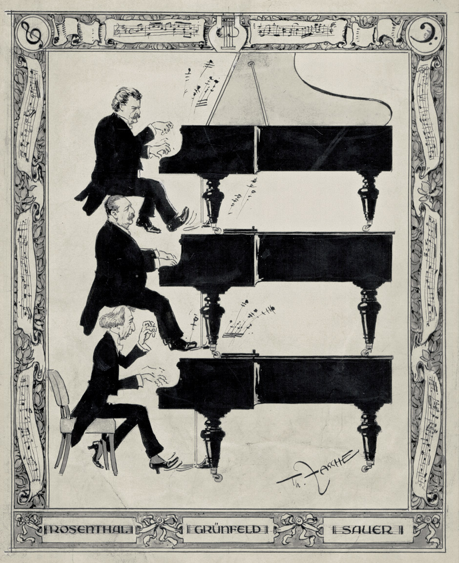 Drei Klaviervirtuosen: Emil von Sauer, Alfred Grünfeld und Moriz Rosenthal.